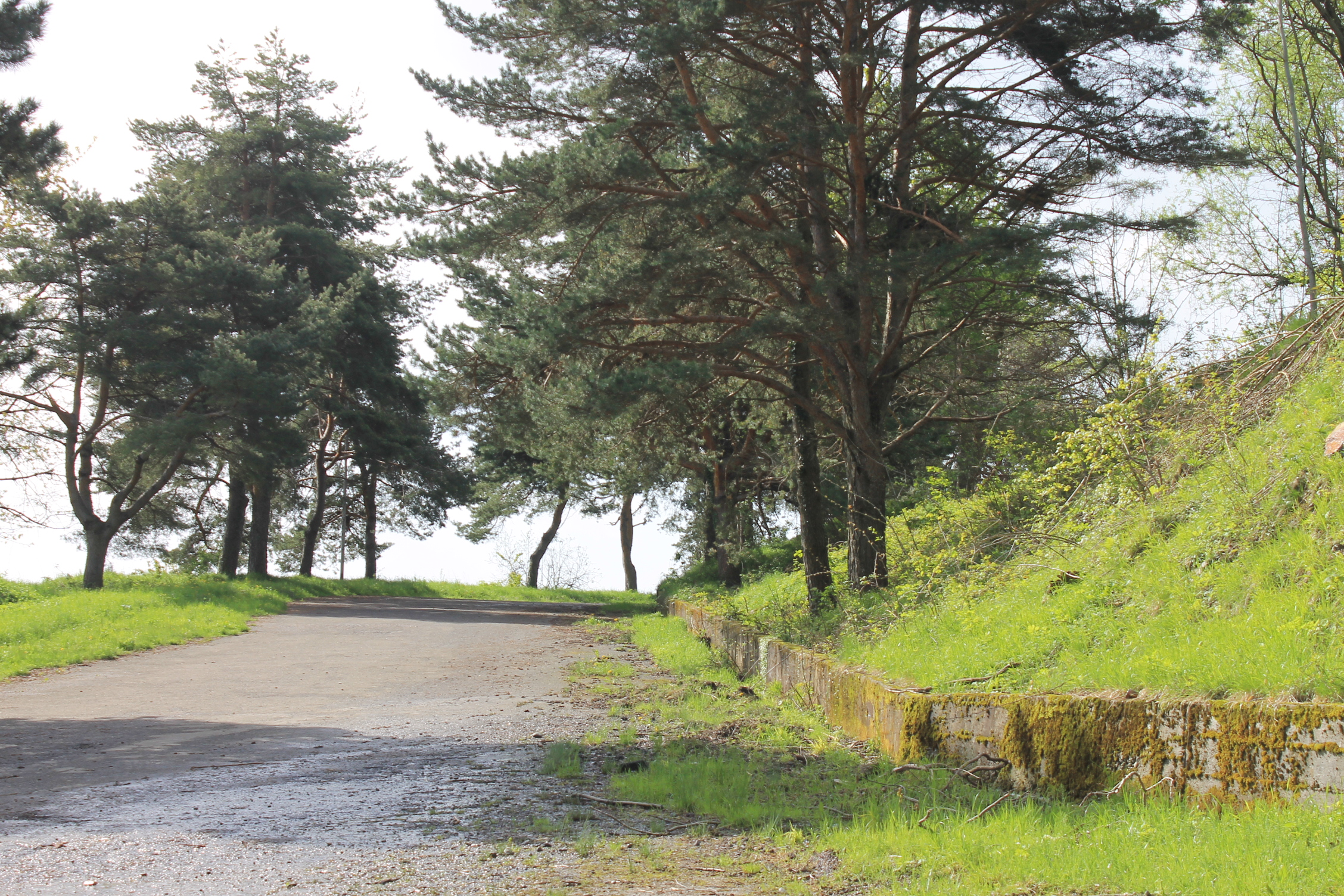 Strada